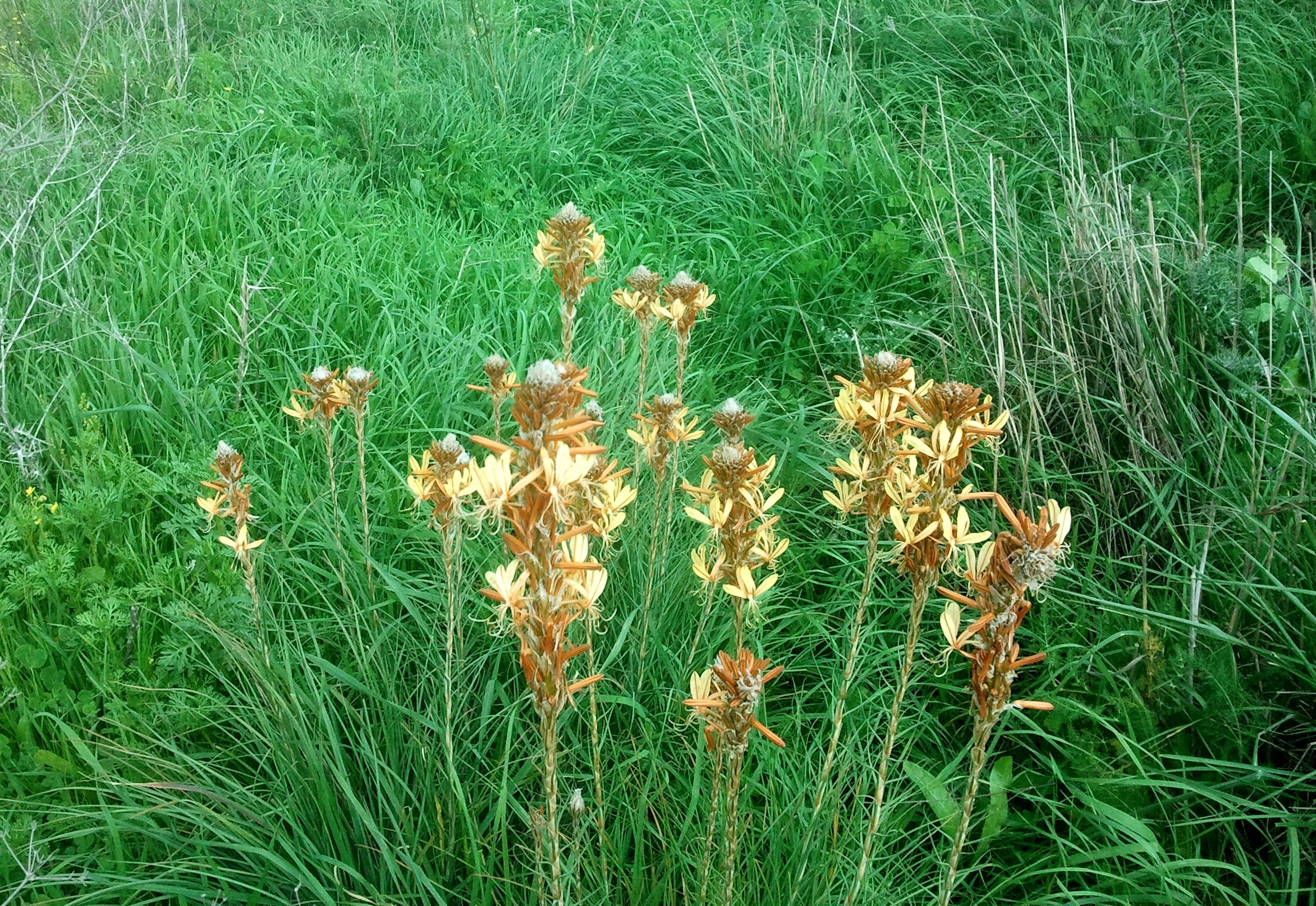 עיריוני צהוב פורח בנחל תות. הוא מין בסוג עיריוני. זהו צמח גאופיט עשבוני רב שנתי ממשפחת השושניים.